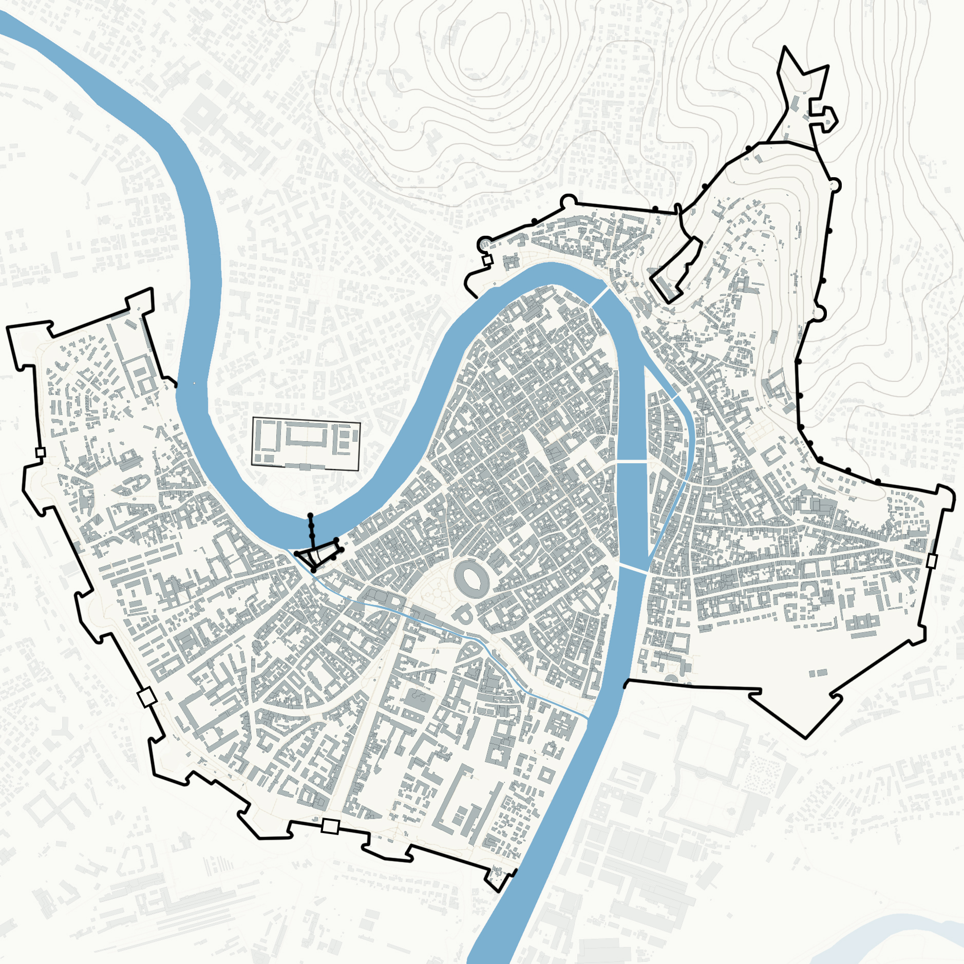 Planimetria della città di Verona con le mura e le porte urbiche principali. Vedi anche Le mura di Verona di Annamaria Conforti Calcagni.